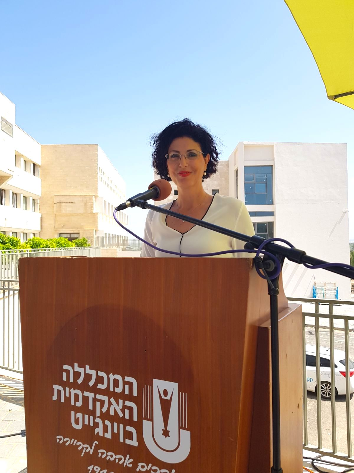 2018 ,ד"ר אורלי קיים במהלך הרצאה במכללת וינגייט